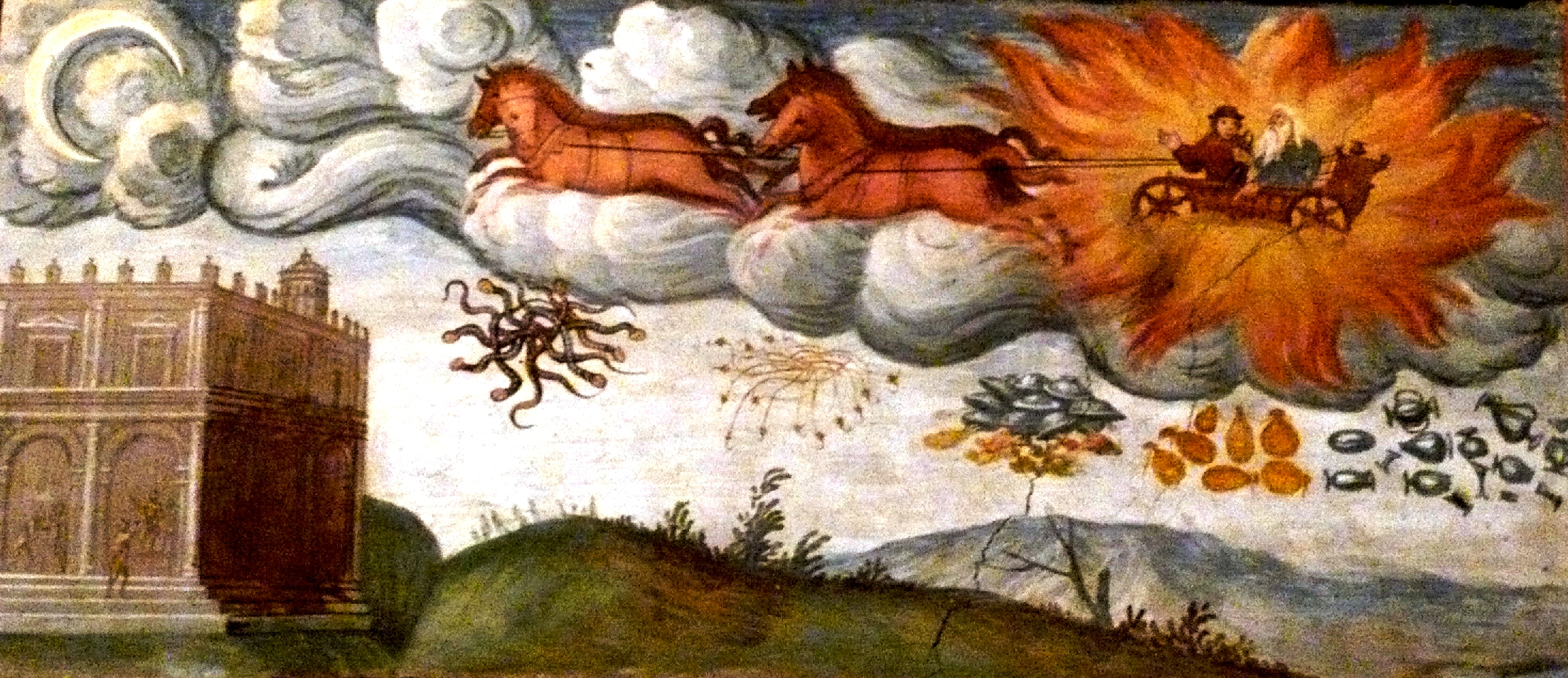 Dipinto di Vincenzo de Barberis su una parete del Salone d'Onore di Palazzo Besta (a Teglio, in provincia di Sondrio) che raffigura la scena dell'Orlando Furioso in cui Astolfo è su un carro diretto verso la Luna. L'opera trae spunto da un'analoga illustrazione presente in un'edizione del poema stampata da Gabriele Giolito de' Ferrari a Venezia nel 1542.